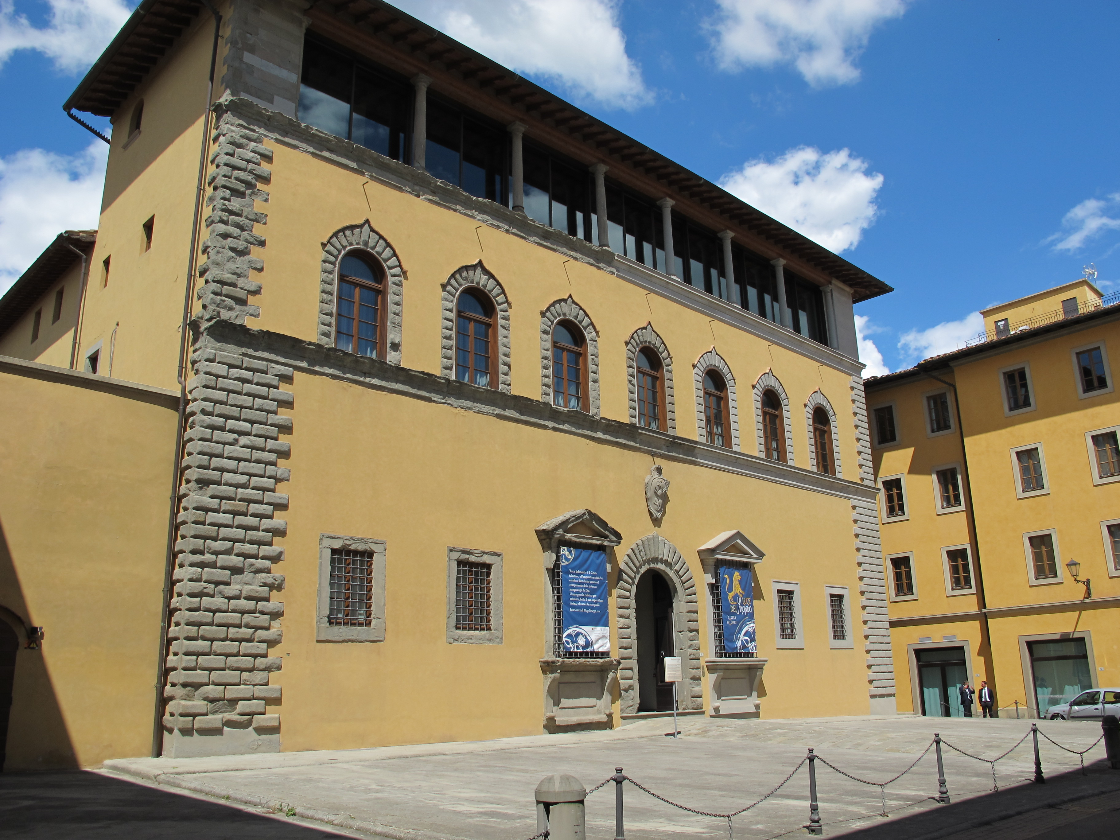 San miniato, palazzo grifoni, ext.